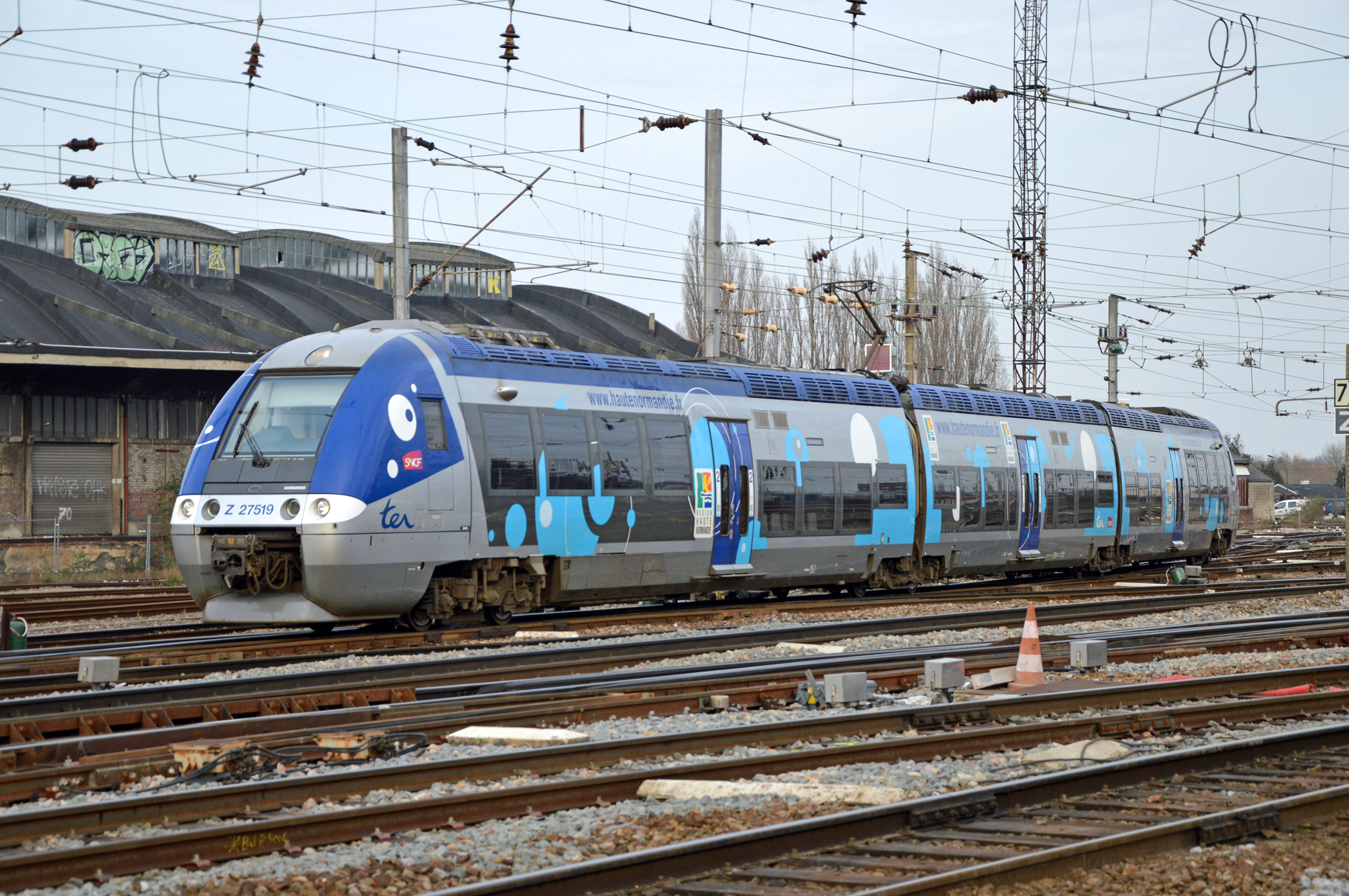 Z 27519-520 sortant du grill marchandise en gare d'Amiens